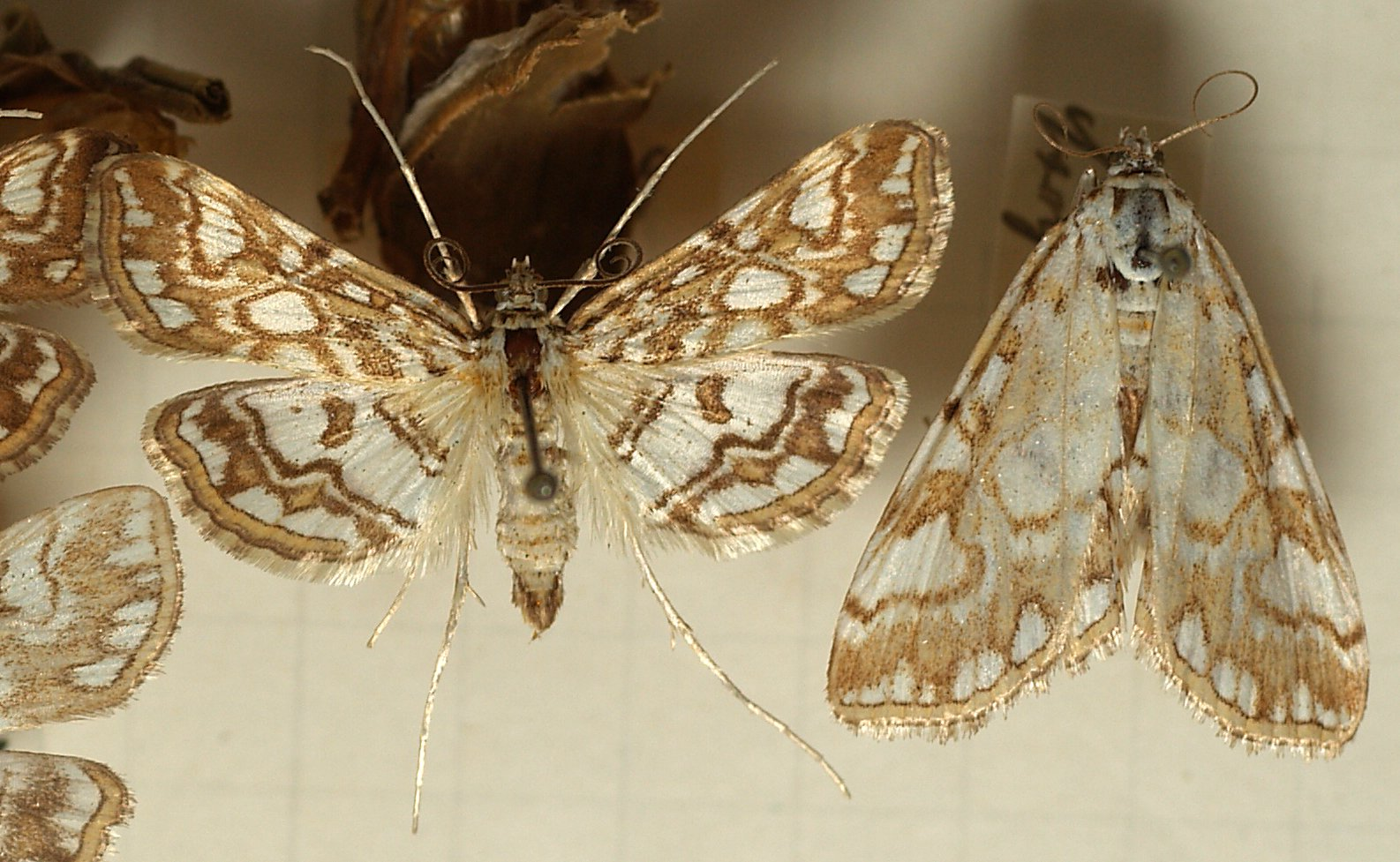 Nymphula nymphaeata